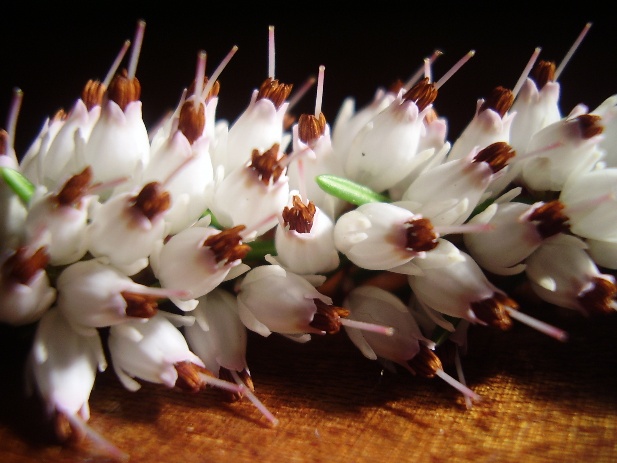 Erica carneawinterheide